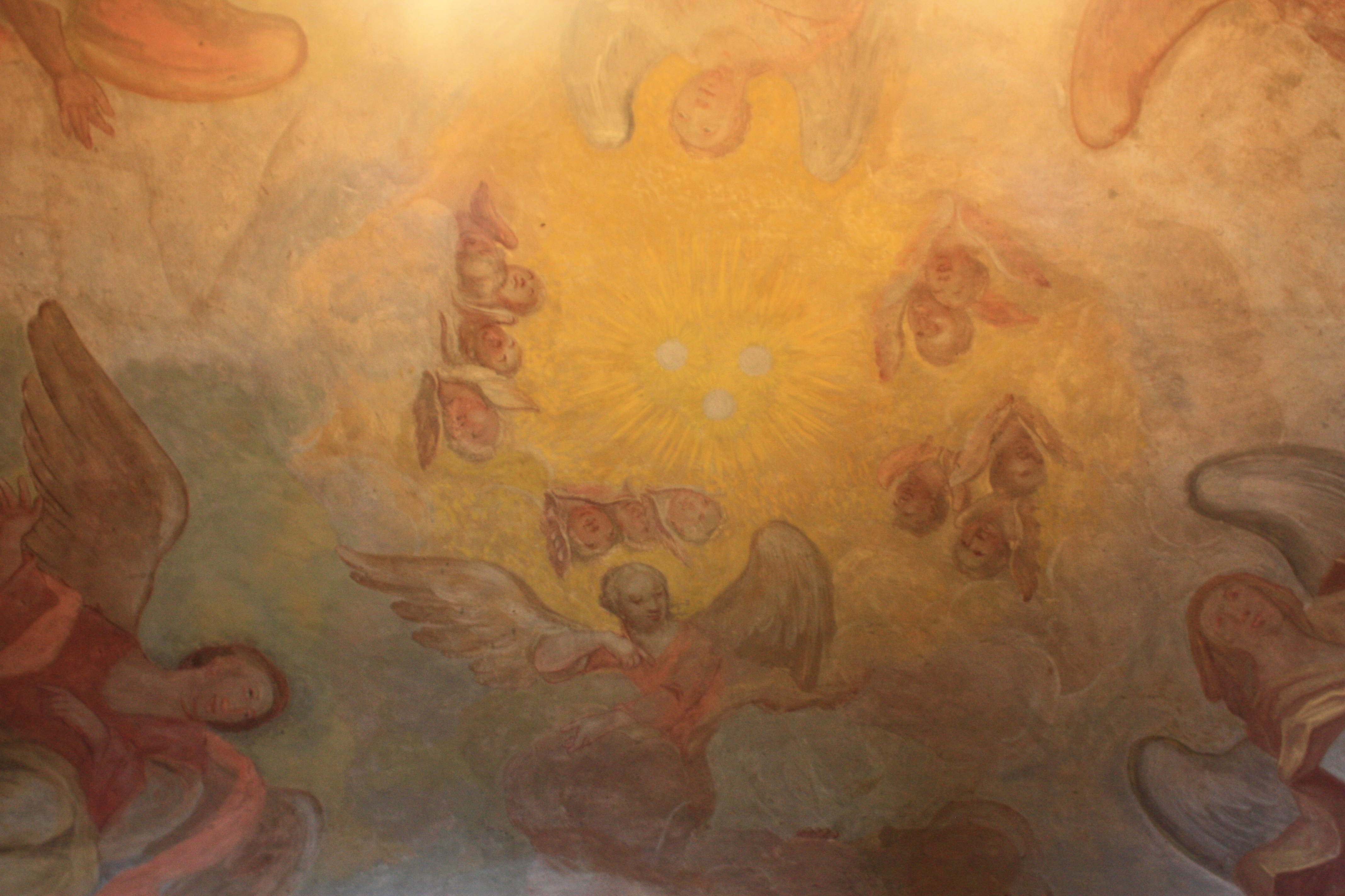 Kościół Bożego Ciała w Poznaniu. Motyw trzech Hostii na sklepieniu pod chórem muzycznym.